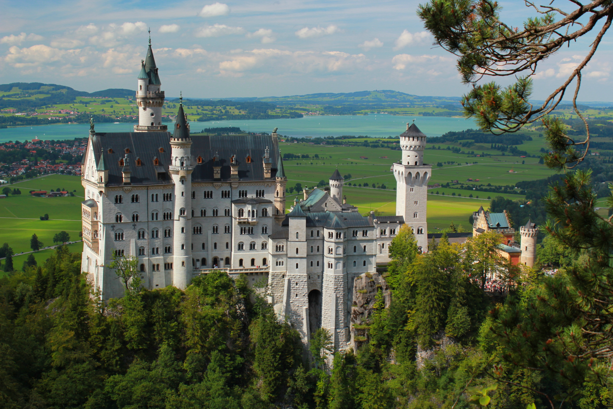 Weg vom Tegelberg über der Marienbrücke Südansicht Schloß Neuschwanstein im Hintergrund der Forggensee